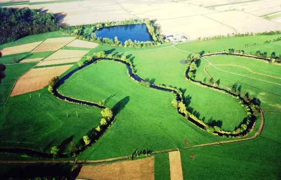 Luftbild von der "Alten Elz" aufgenommen bei einer Ballonfahrt